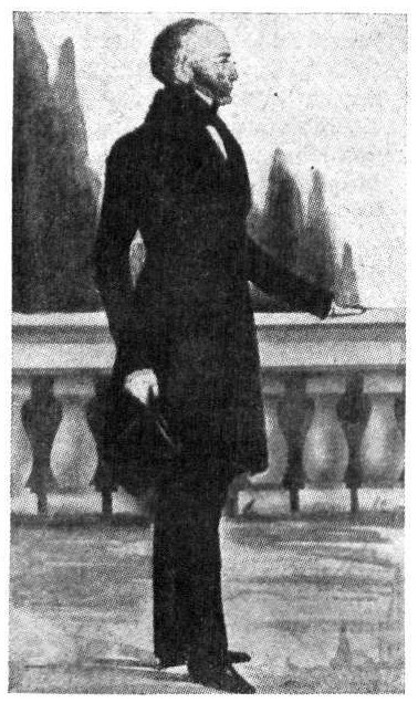 Retrato de cuerpo entero de Juan Miller (1787-1843), estanciero de origen escocés, propietario de la estancia "La Celedonia" en Cañuelas (Provincia de Buenos Aires).